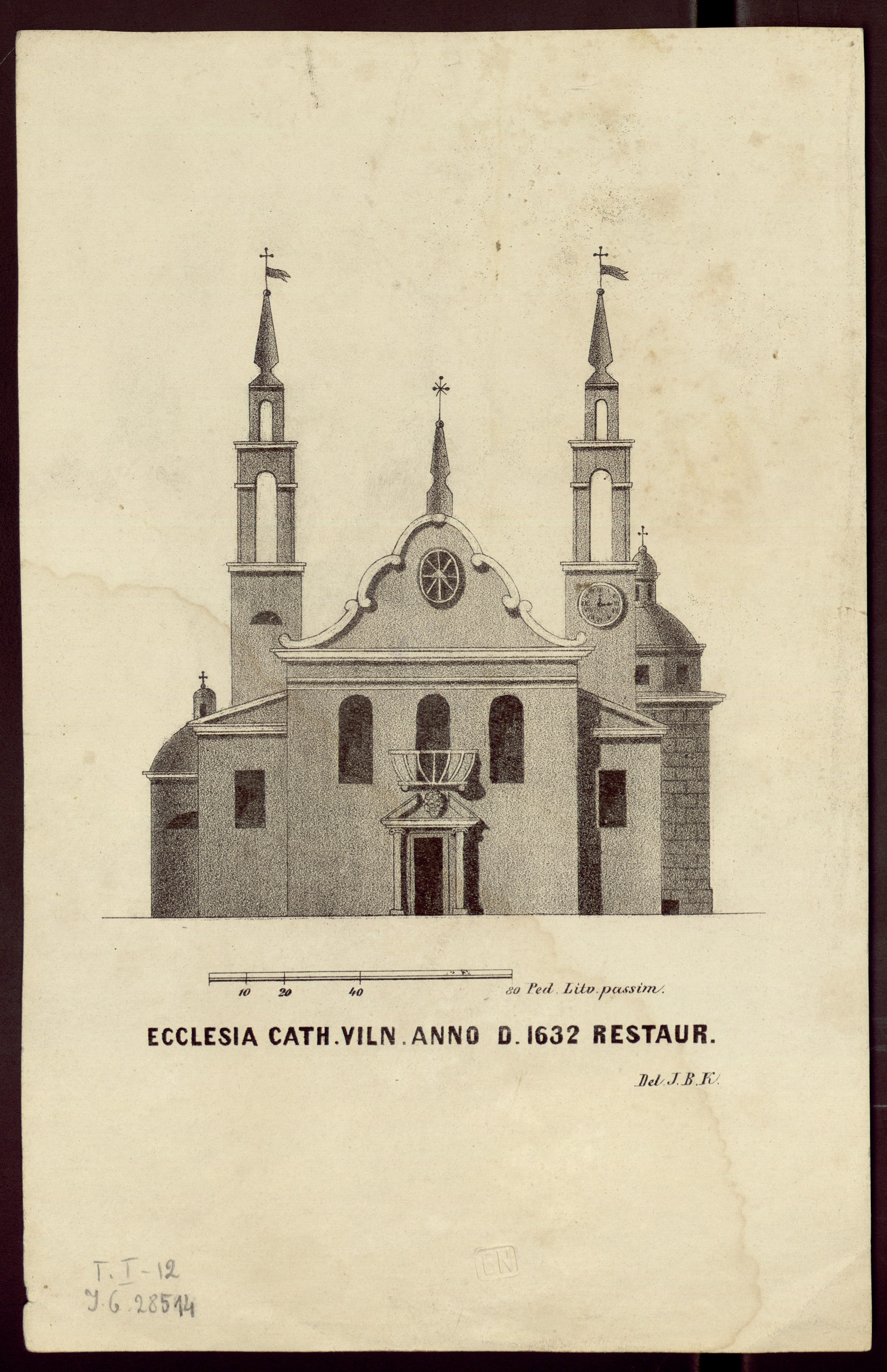 Беларуская (тарашкевіца): Вільня (Vilnia), Катэдра. Рэканструкцыя на 1632 год